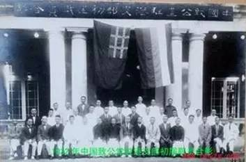 1932年《中国致公党香港支部初届职员会议》职员的集体照，悬挂中华民国五色旗与中国致公党井字旗。